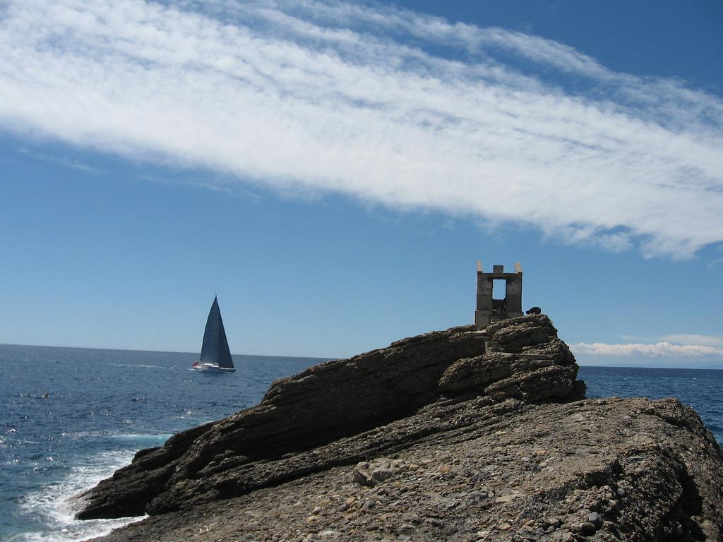 Scoglio di Punta Chiappa, Liguria, Italia